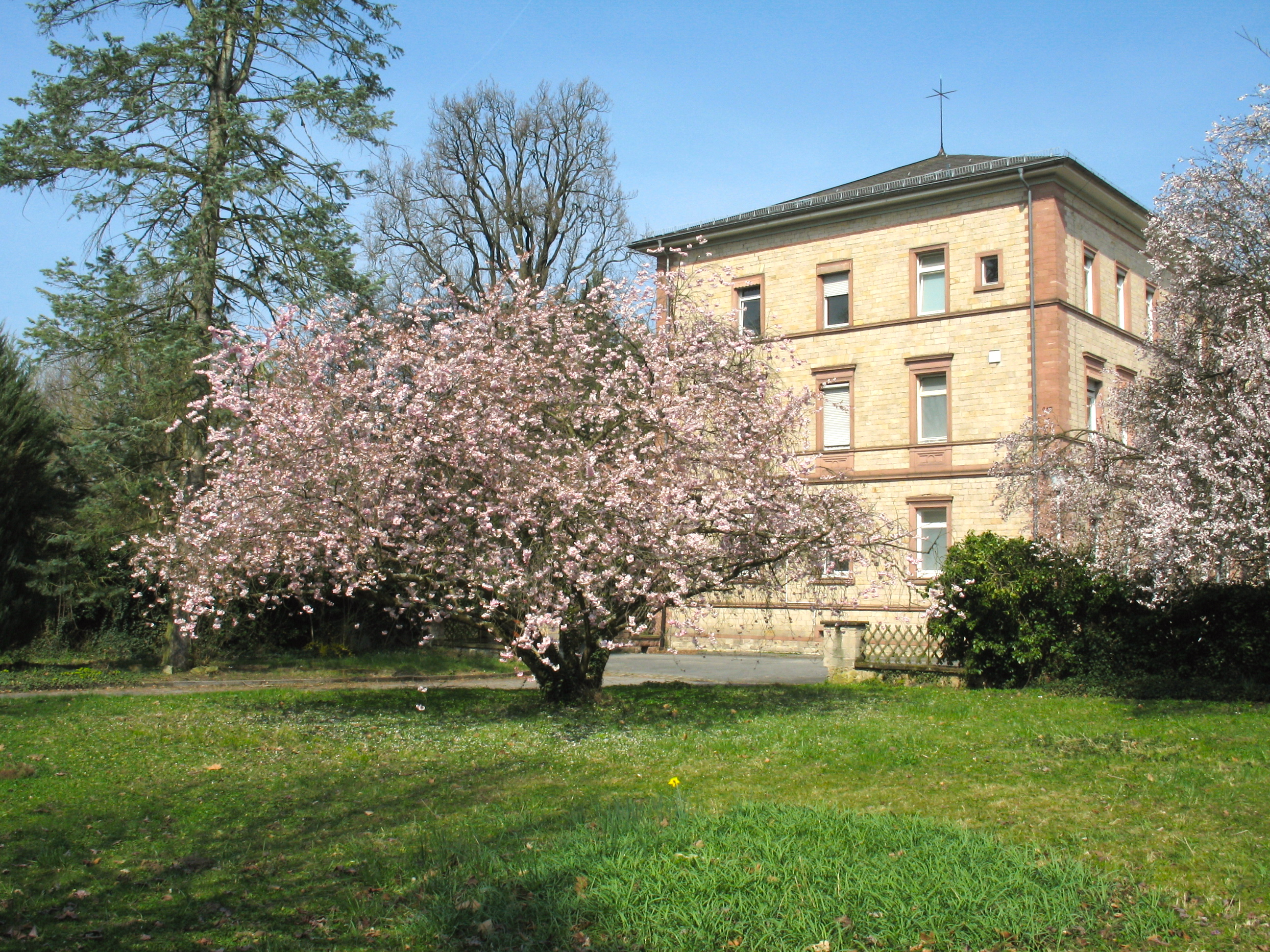 Arboretum Heppenheim an der Bergstraße. Gartenbereich im Süden des Hauptgebäudes mit Japanischer Blütenkirsche (Bildmitte).